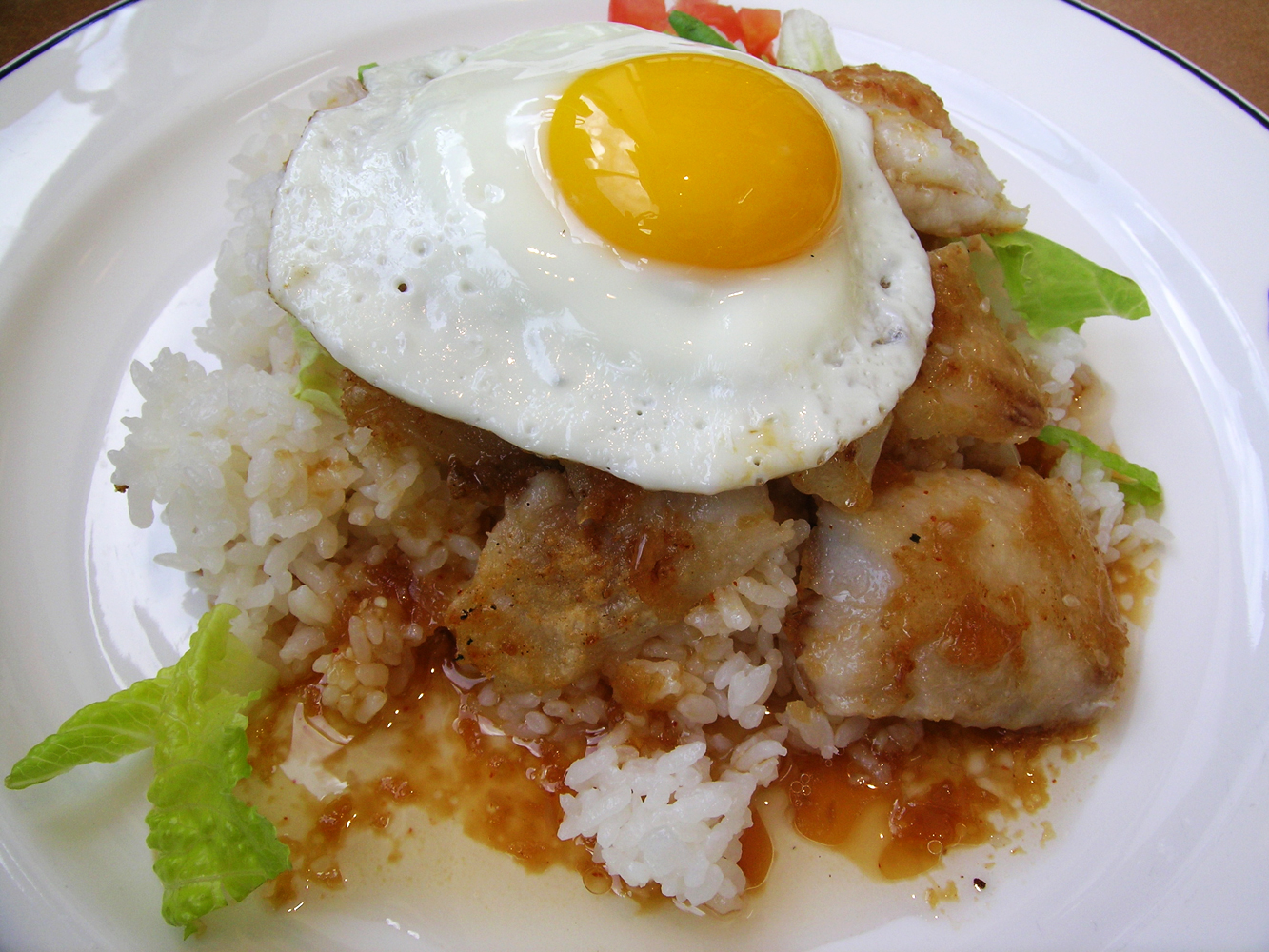 Fish Loco Moco at Kimuraya Restaurant at Kahala Mall in Honolulu